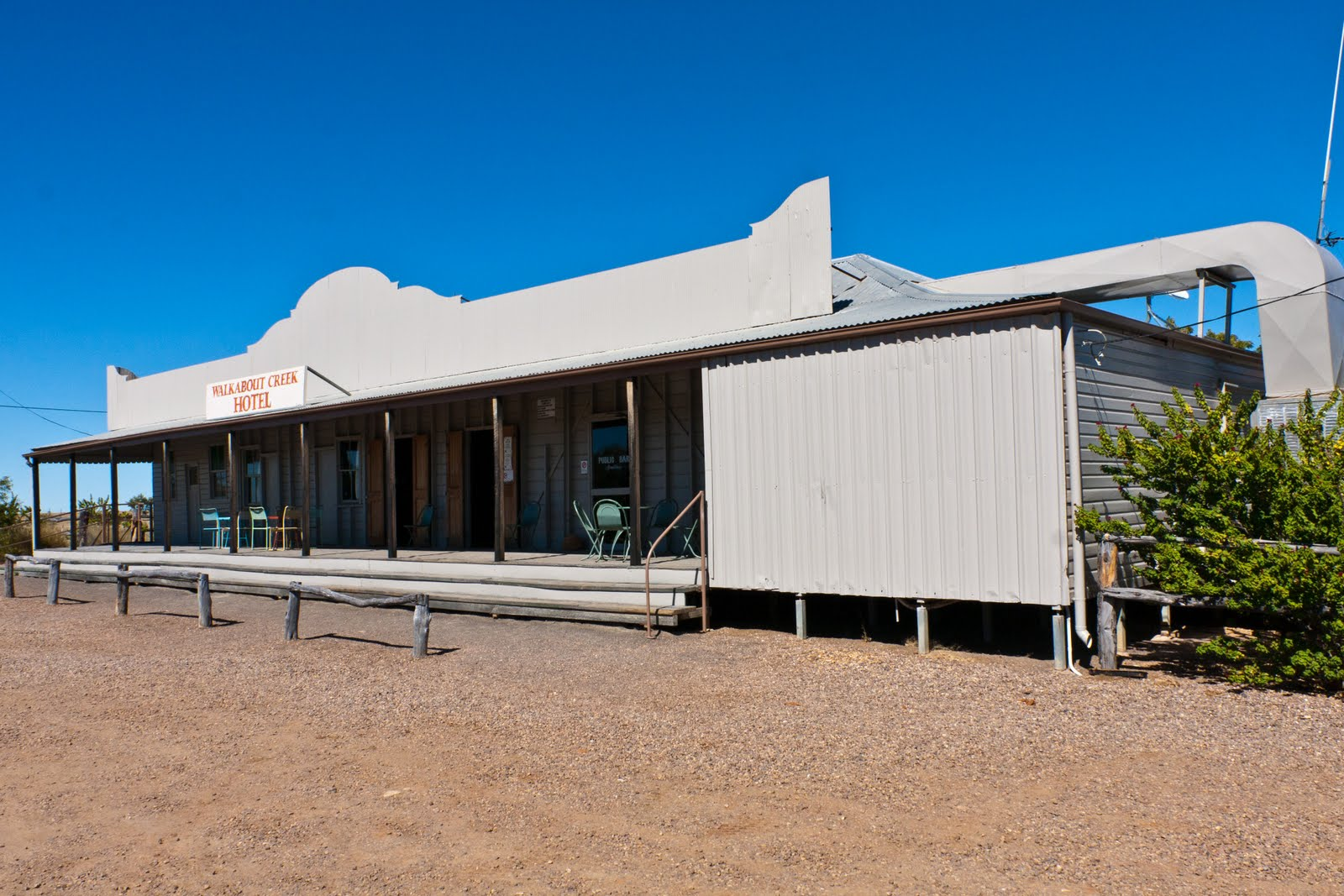 Отель Вок-абаут-Крик